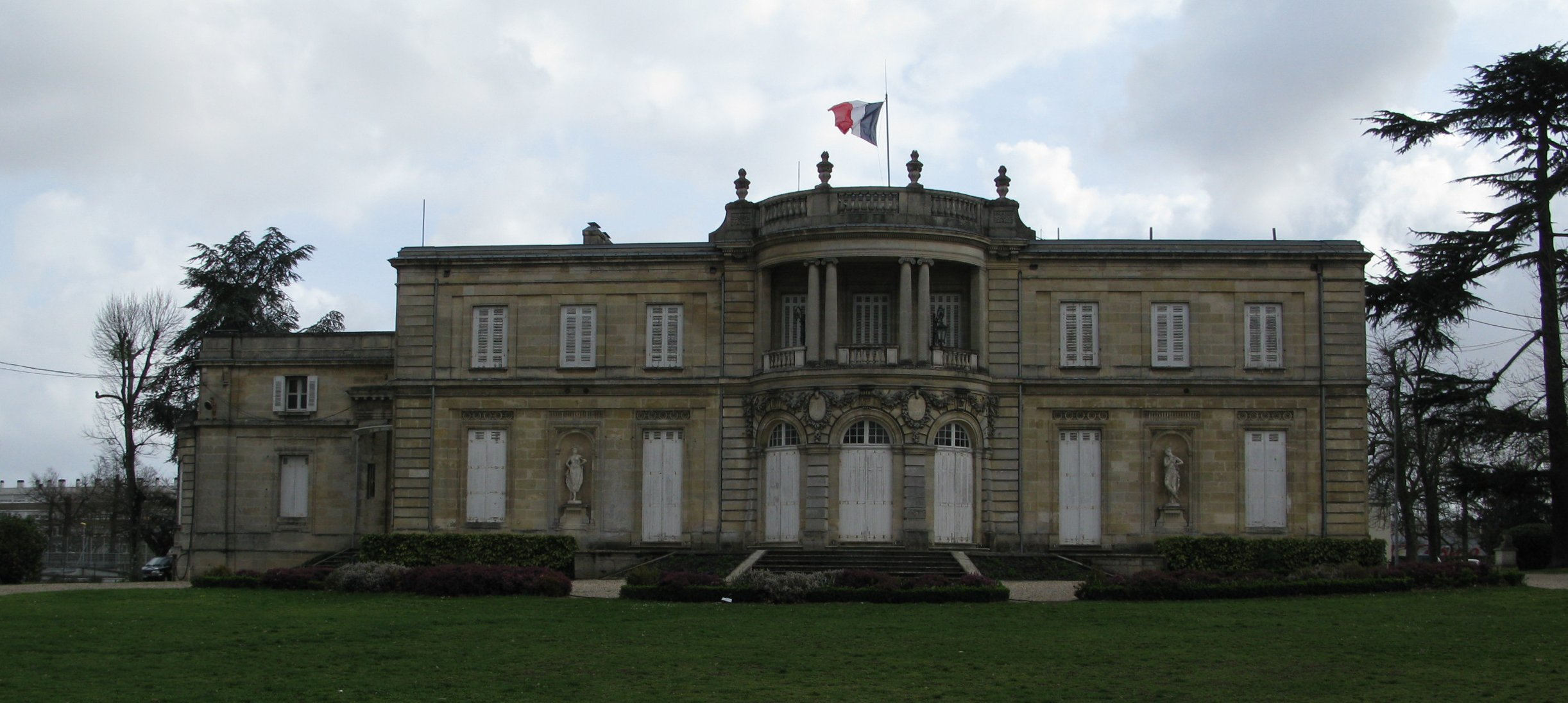 Le château Peixotto à Talence